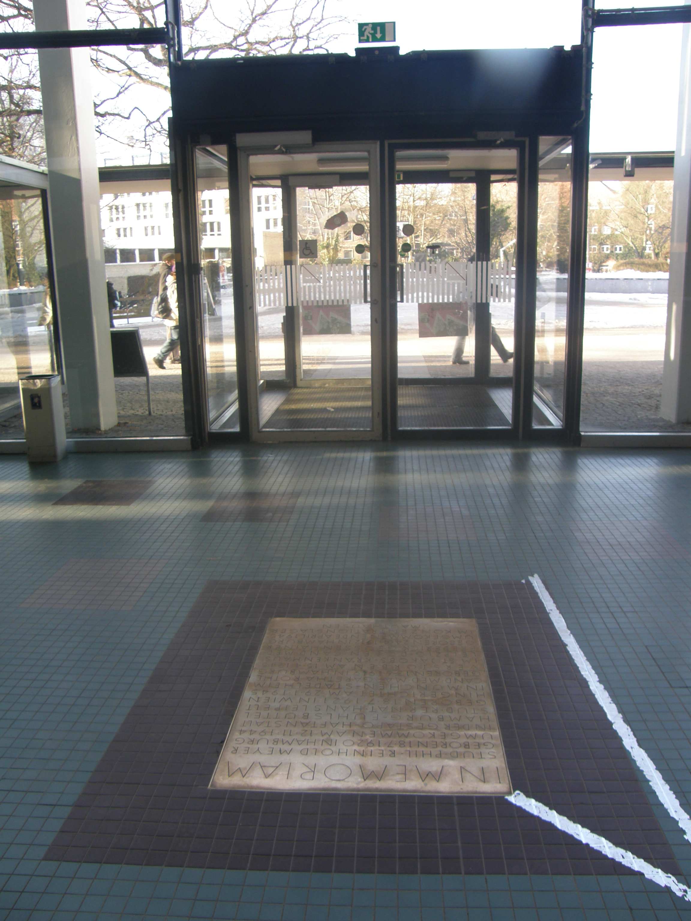 Gedenktafel für die studentischen Mitglieder der Weißen Rose (Hamburg) im Widerstand gegen den Nationalsozialismus